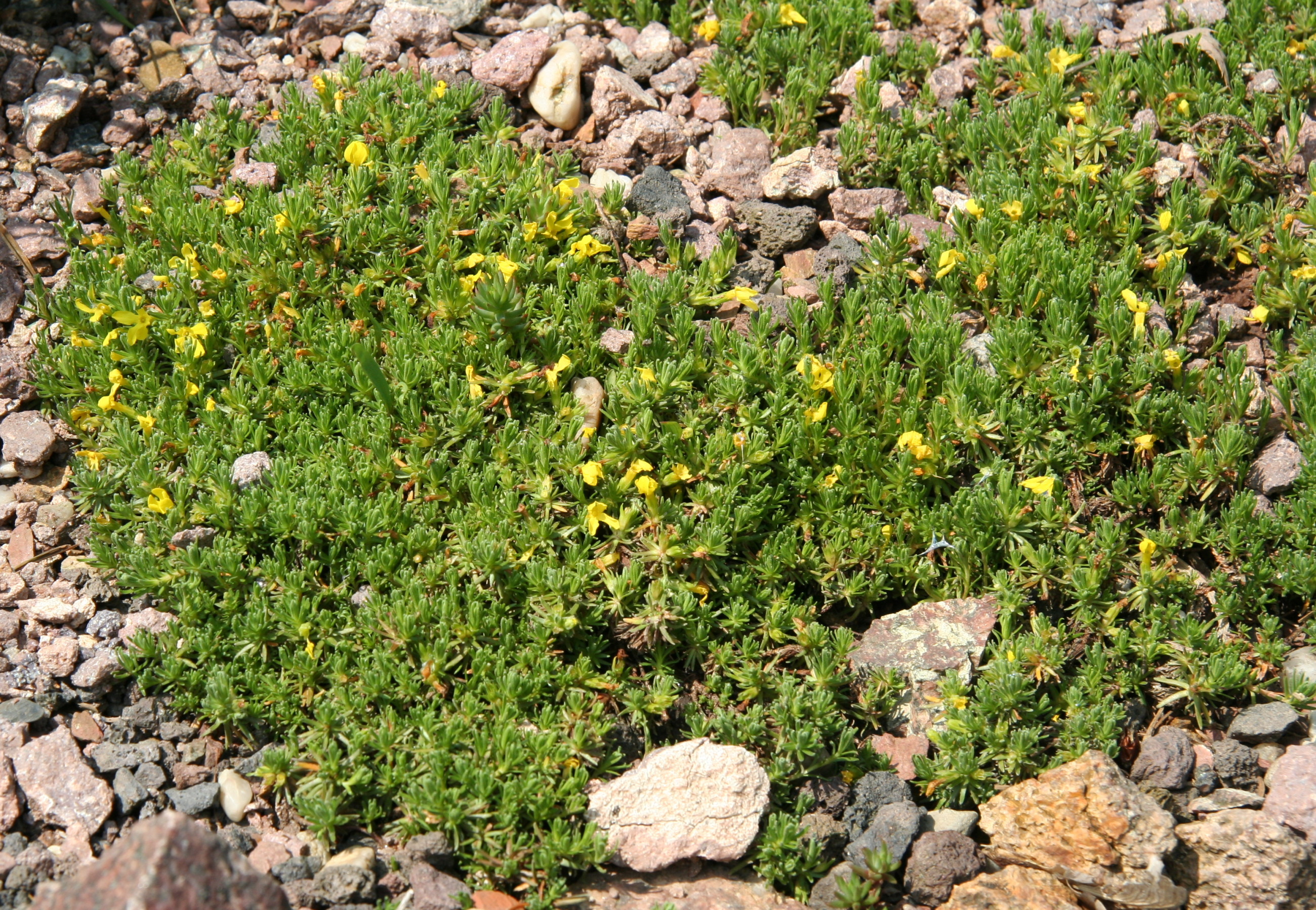 Vitaliana primuliflora im Botanischen Garten Dresden